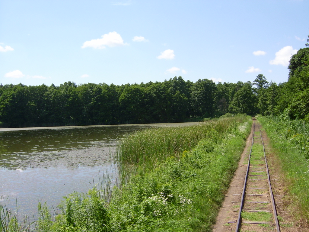 A Mesztegnyői Állami Erdei Vasút mellett található halastó a kisvasút pályájával.